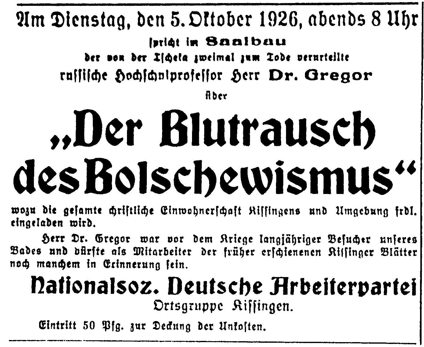 historical marketing of a NSDAP meeting in Bad Kissingen 1926 (Saale-Zeitung, Bad Kissingen, 10-02-1926)